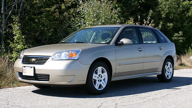 Chevrolet Malubi Maxx